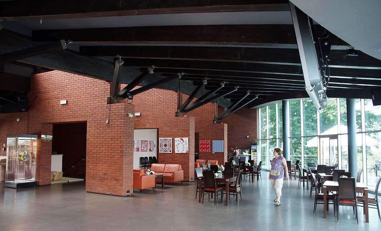 Dalej widać część kawiarnianą.